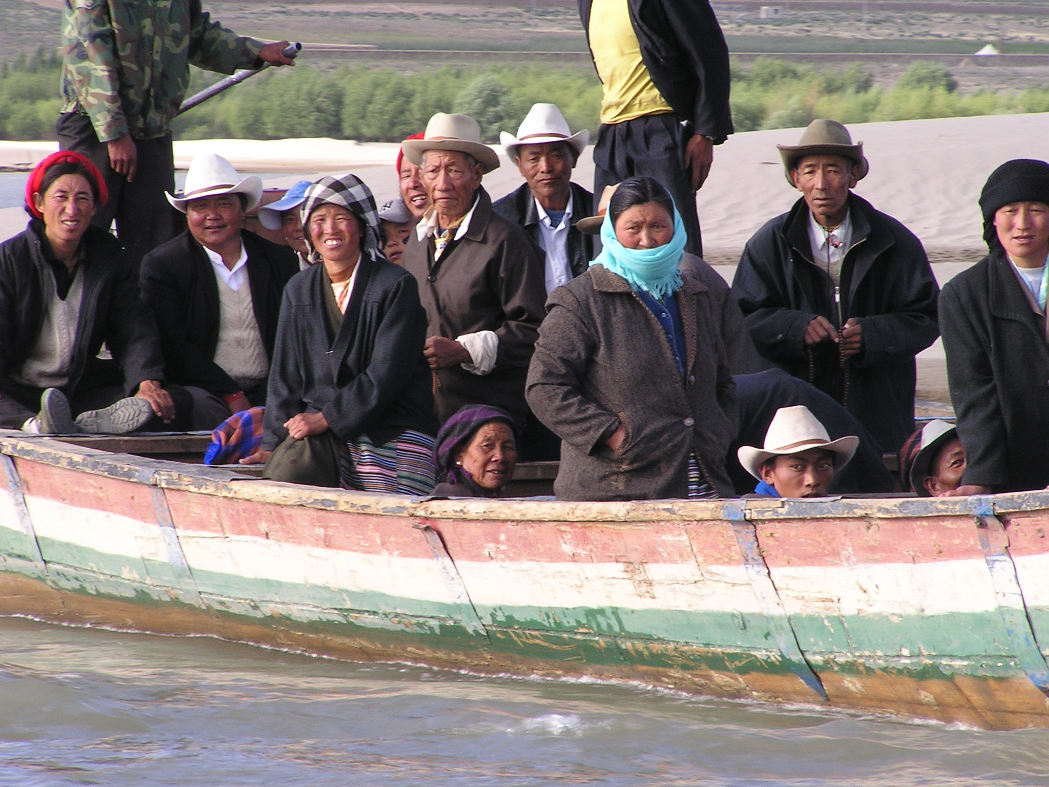 Brahmaputra 9